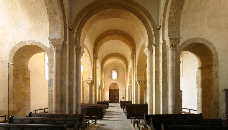 Vue de la nef de l'église d'Iguerande prise de l'abside